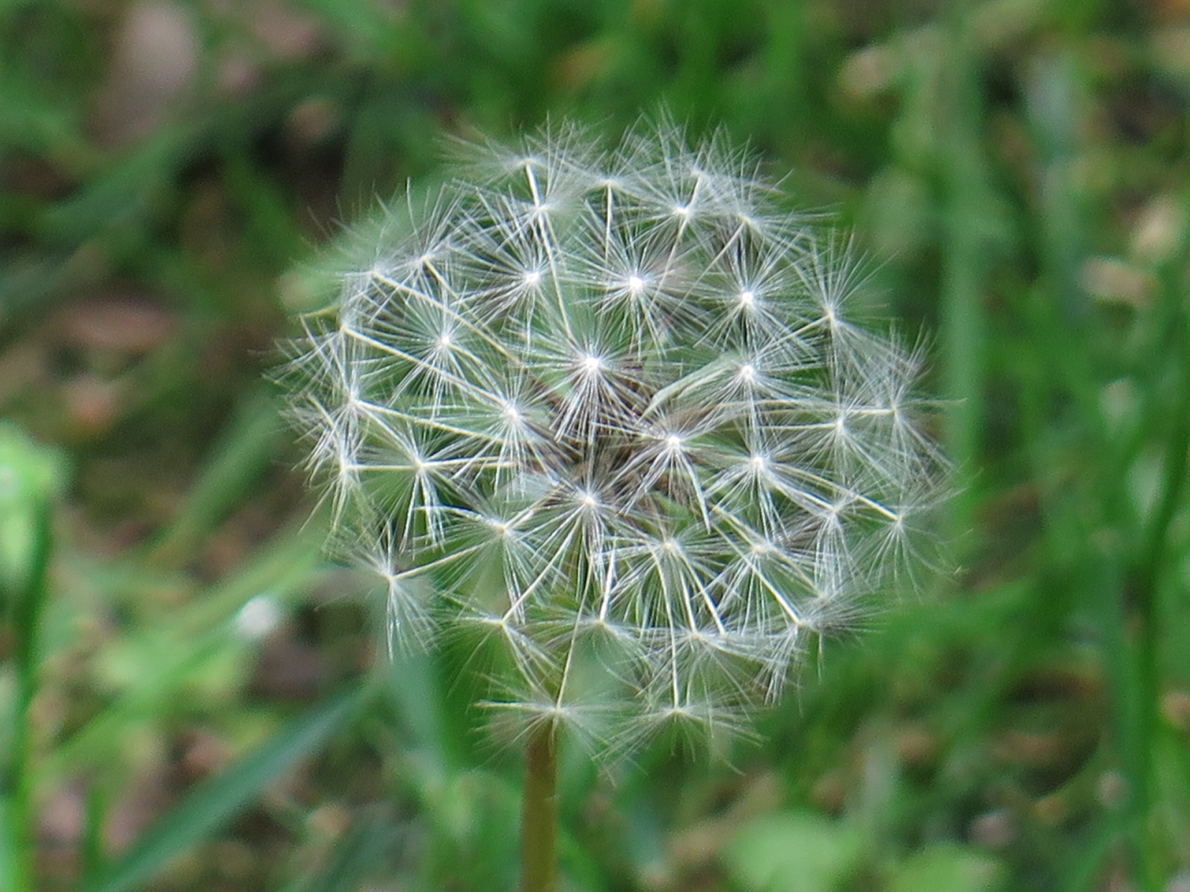 Infruttescenza del taraxacum officinale